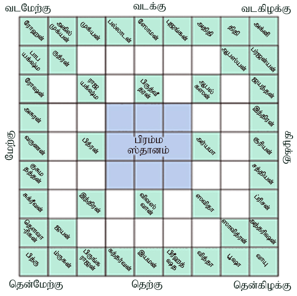 வாஸ்து மண்டலம்